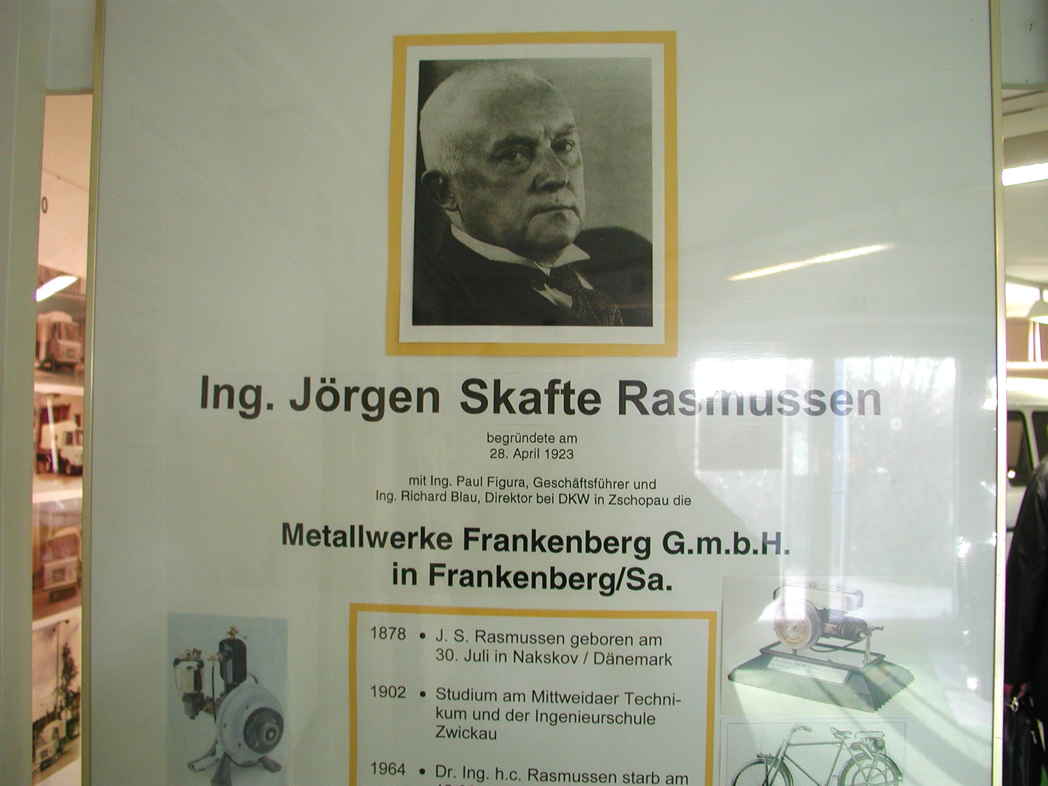 Ausstellungstafel im Fahrzeugmuseum Frankenberg/Sa.